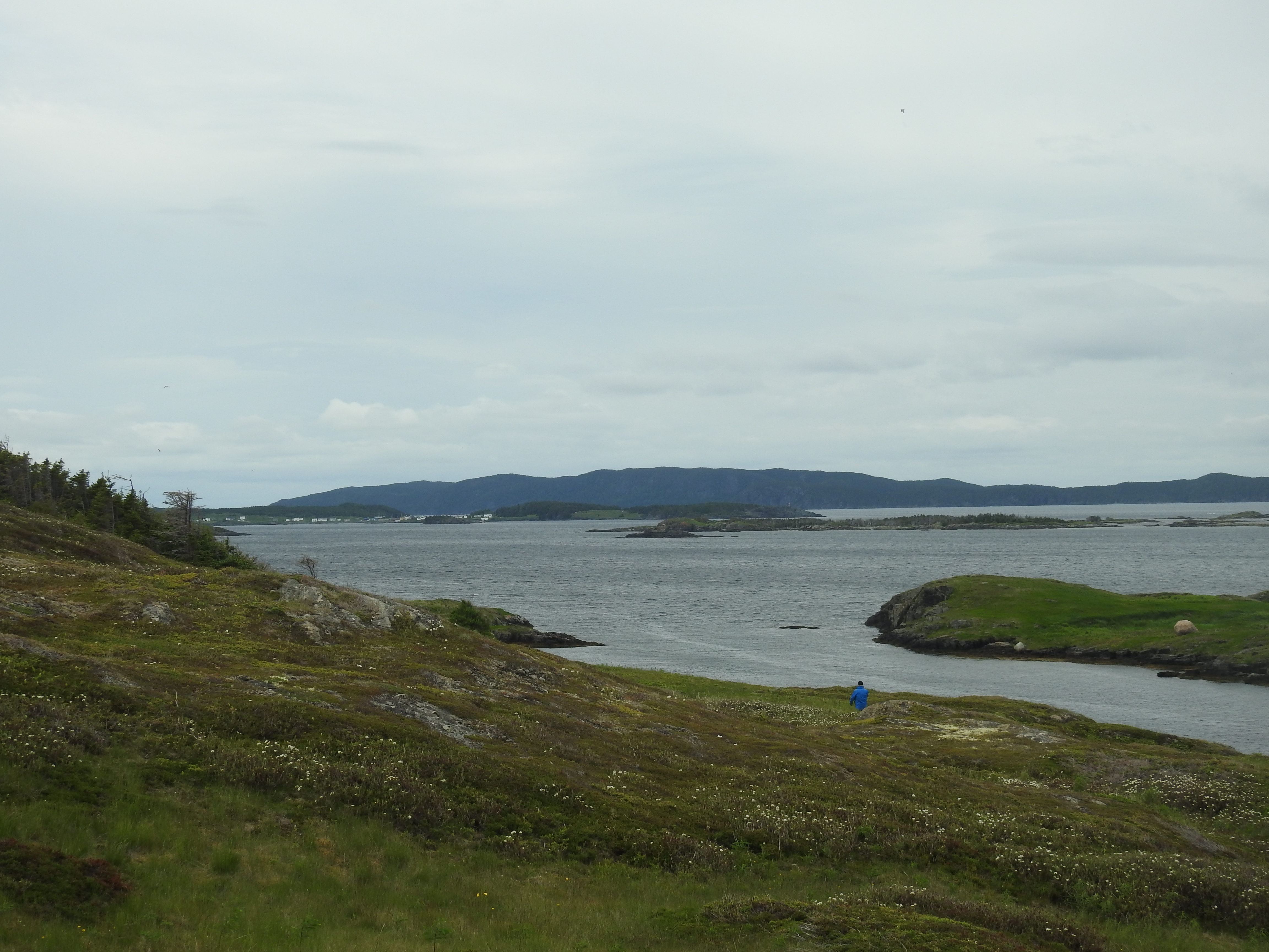 Magnificent